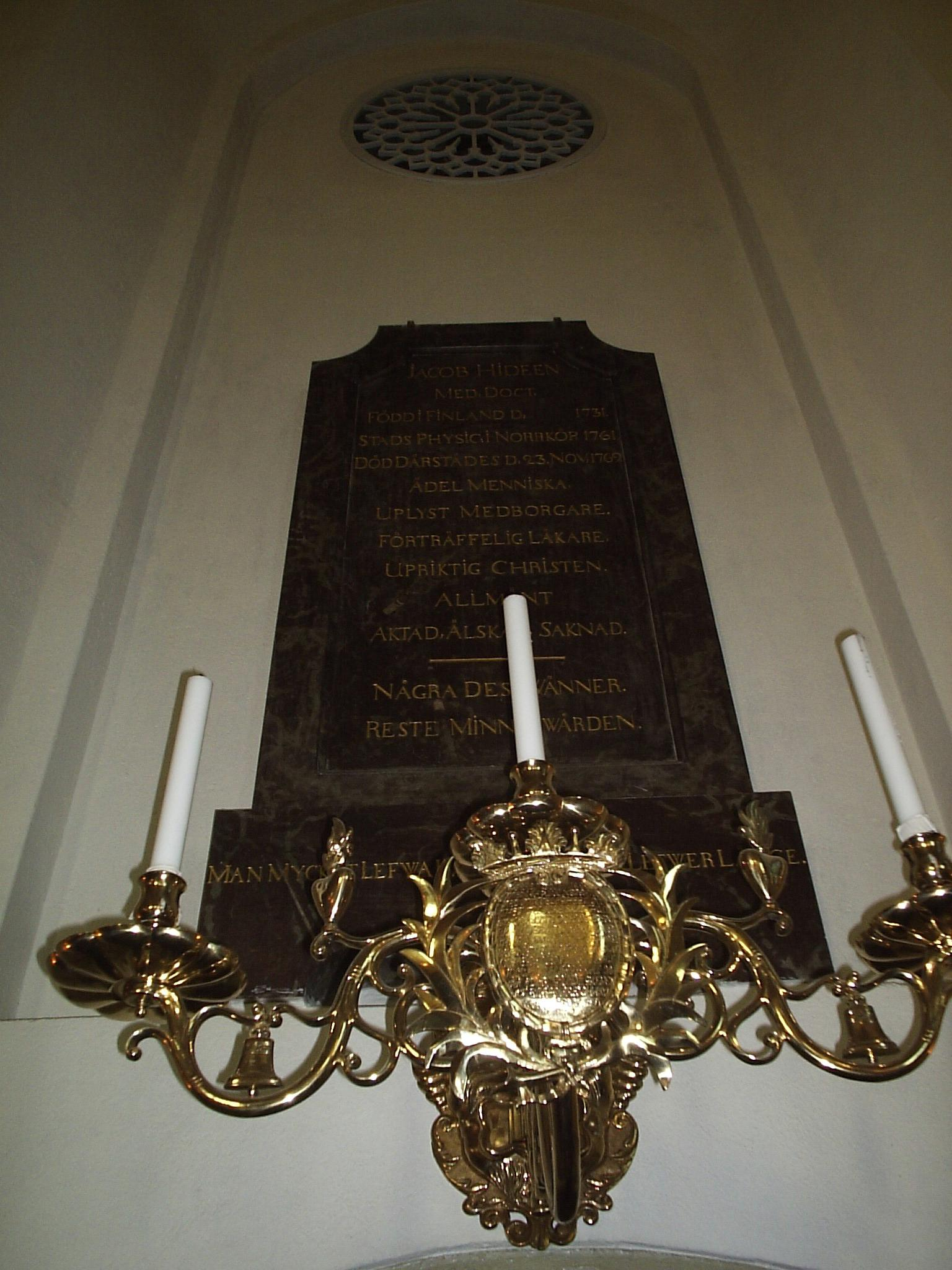 Minnesvården över Jacob Hideen i Sankt Olai kyrka i Norrköping, fotograferad den 21 november 2005 av Harri Blomberg. Denna kyrka utmärker upplysningstidens smak och saknar därmed epitafier, gravstenar eller minnesvårdar. Endast en minnesvård i brun marmor uppsattes på nordväggen över ingången till sakristian, vid sidan av några äldre gravstenar lagda i den stora gången. Den är ett minne av den forne stadsläkaren i Norrköping under åren 1761-1769, Jacob Hideen, som föddes i Kauhajoki den 29 juni 1731 och vilken blev medicine doktor i Uppsala 1759, såsom elev till Carl von Linné. Minnesvårdens text lyder: "Jacob Hideen. Med: doct: Född i Finland d: 1731. Stads Physic. i Norrköping 1761. Död därstädes d. 23 Nov. 1769. Ädel menniska, uplyst medborgare, förträffelig läkare, upriktig christen, allmänt aktad, älskad saknad. Några dess wänner reste minneswården. Man mycket lefwa kan, fast man ej lefwer länge."